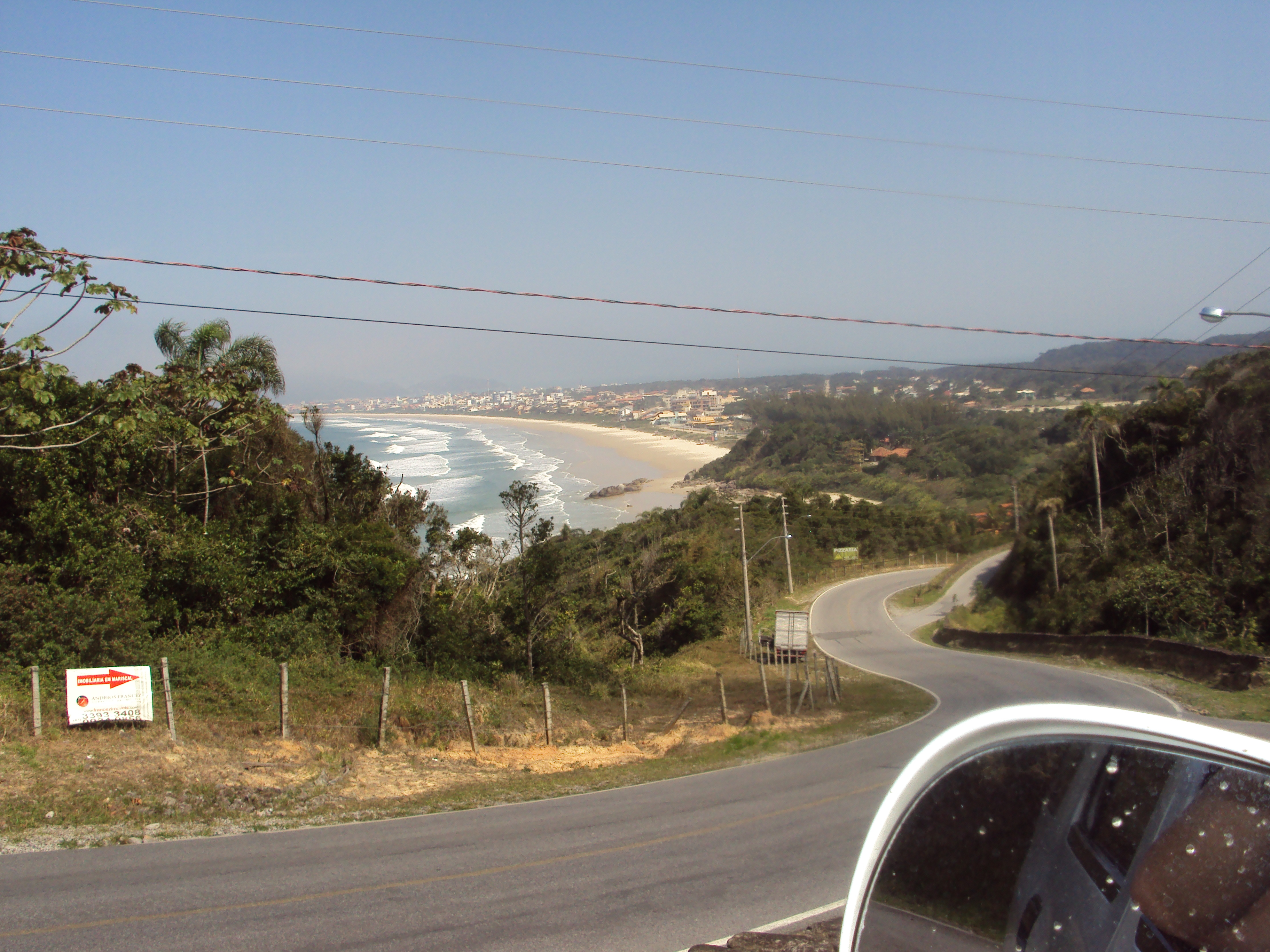 Praias de Santa Catarina